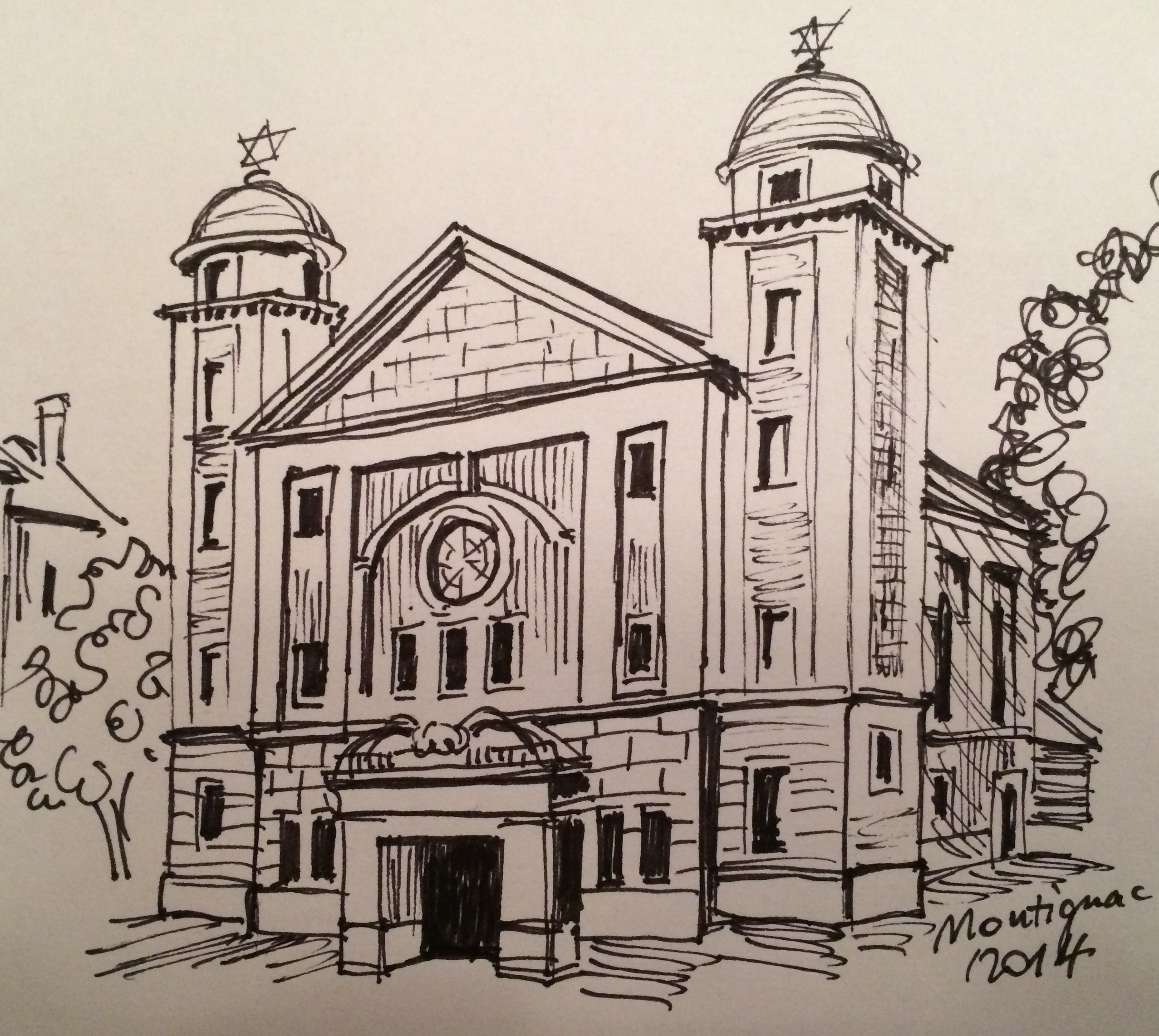 Nieistniejąca synagoga w Sopocie, ul. Dąbrowskiego 1.